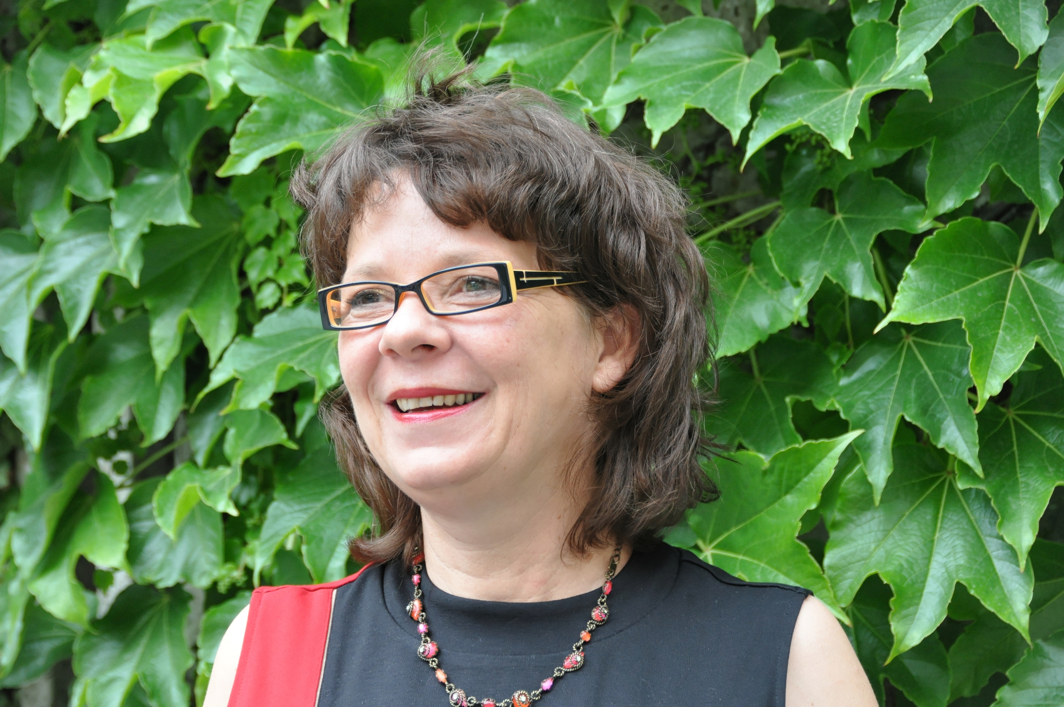 Landtagsprojekt Bayern